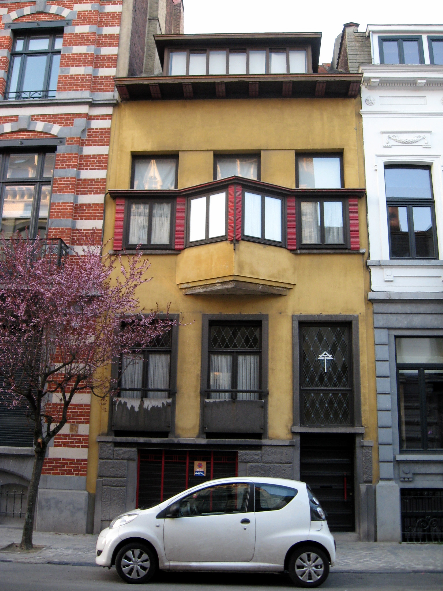 Eigen huis van architect Antoine Pompe